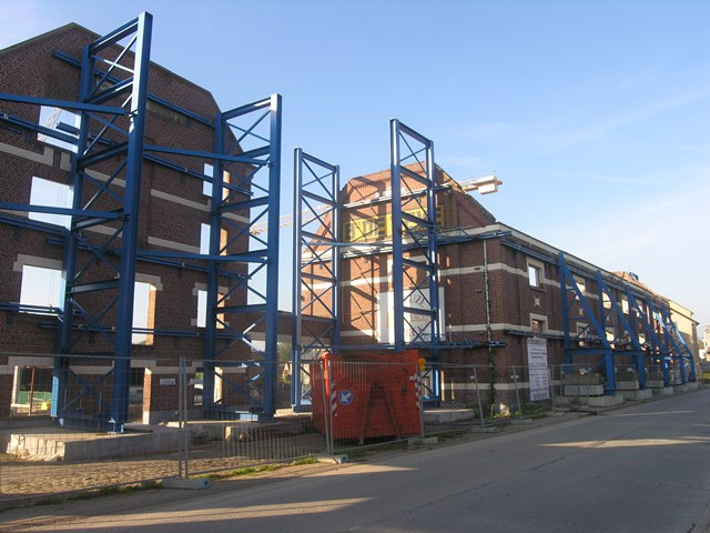 Dilbeek_Schepdaal_Isabellastraat_50_52_brouwerijDeNeve_1 This is a possible Onroerend Erfgoed: Find the monument in the Monuments database: Unknown street in Dilbeek All Onroerend Erfgoed in Dilbeek Is this Onroerend Erfgoed? Yes No More images to work at in Category:Possible onroerend erfgoed.